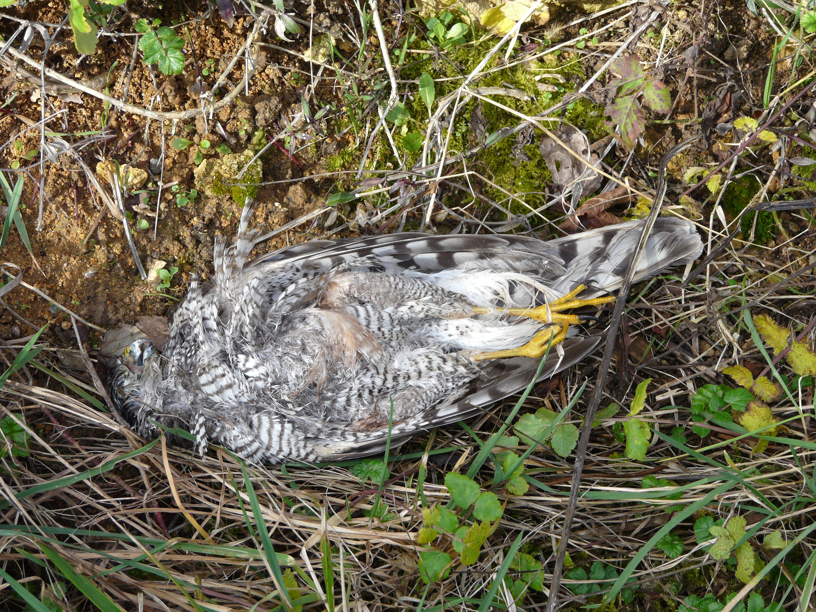 Épervier mort. Ligueux, Dordogne, France